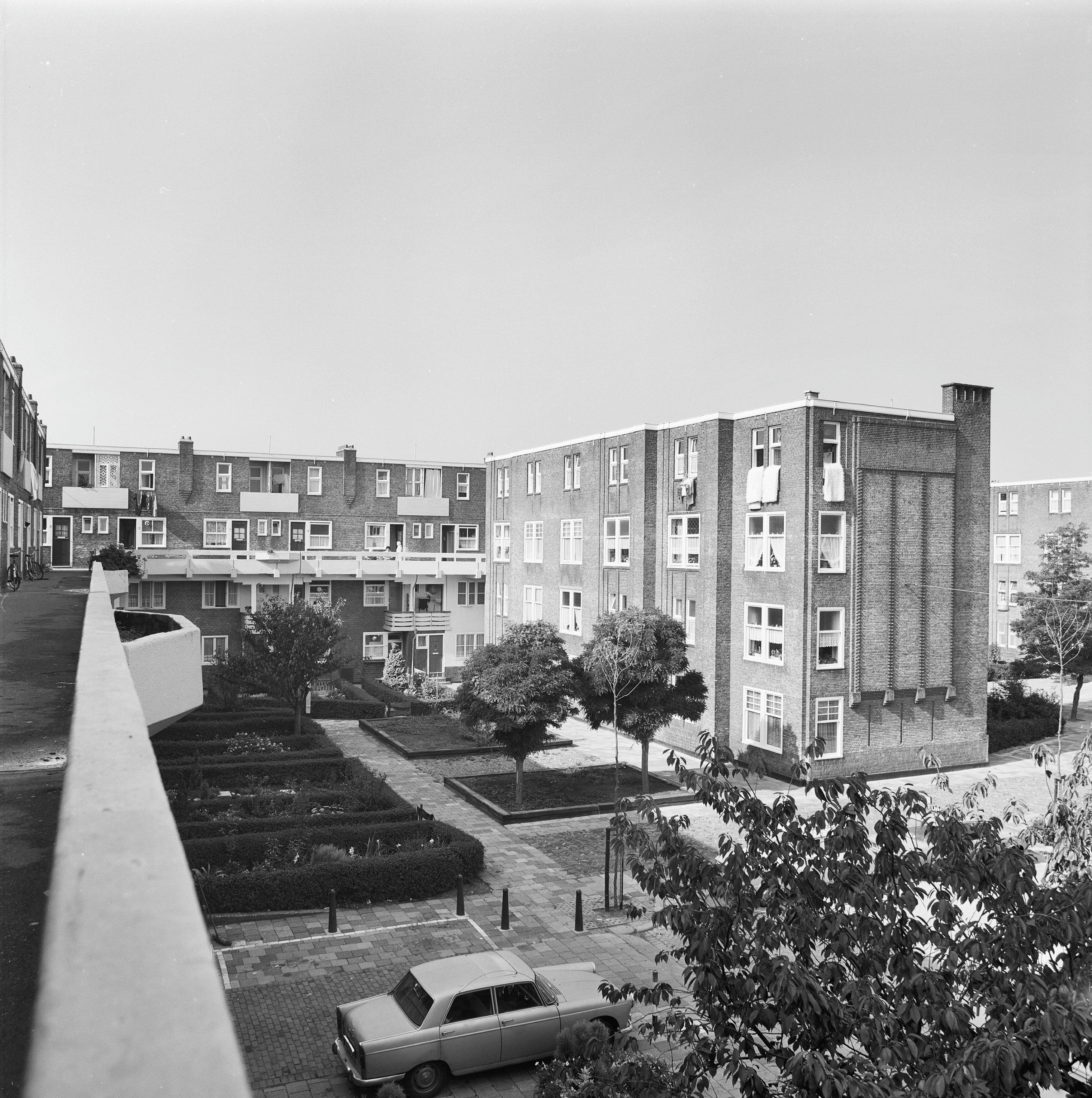 Woonwijk Spangen: overzicht Langendijkstraat - Spaansche bocht